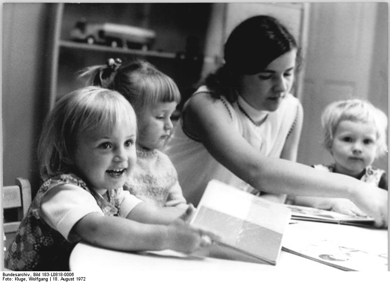 Schenkenberg, Blick in den Erntekindergarten ADN-ZB Kluge 18.8.72 Bez. Leipzig: Während Mutti auf dem Feld arbeitet, spielt Anke (l.) in der Kinderkrippe bei Tante Sabine (Mitte). Den Genossenschaftsbäuerinnen der Kooperationsgemeinschaft Schenkenberg ist die Sorge um die Betreuung ihrer Kinder abgenommen. Im Kindergarten und in der Tageskrippe sind die Kleinen gut ungebracht. Die Schülerin Sabina Schulze hilft während der Erntezeit in der Kirppe mit. (siehe auch 7 N)